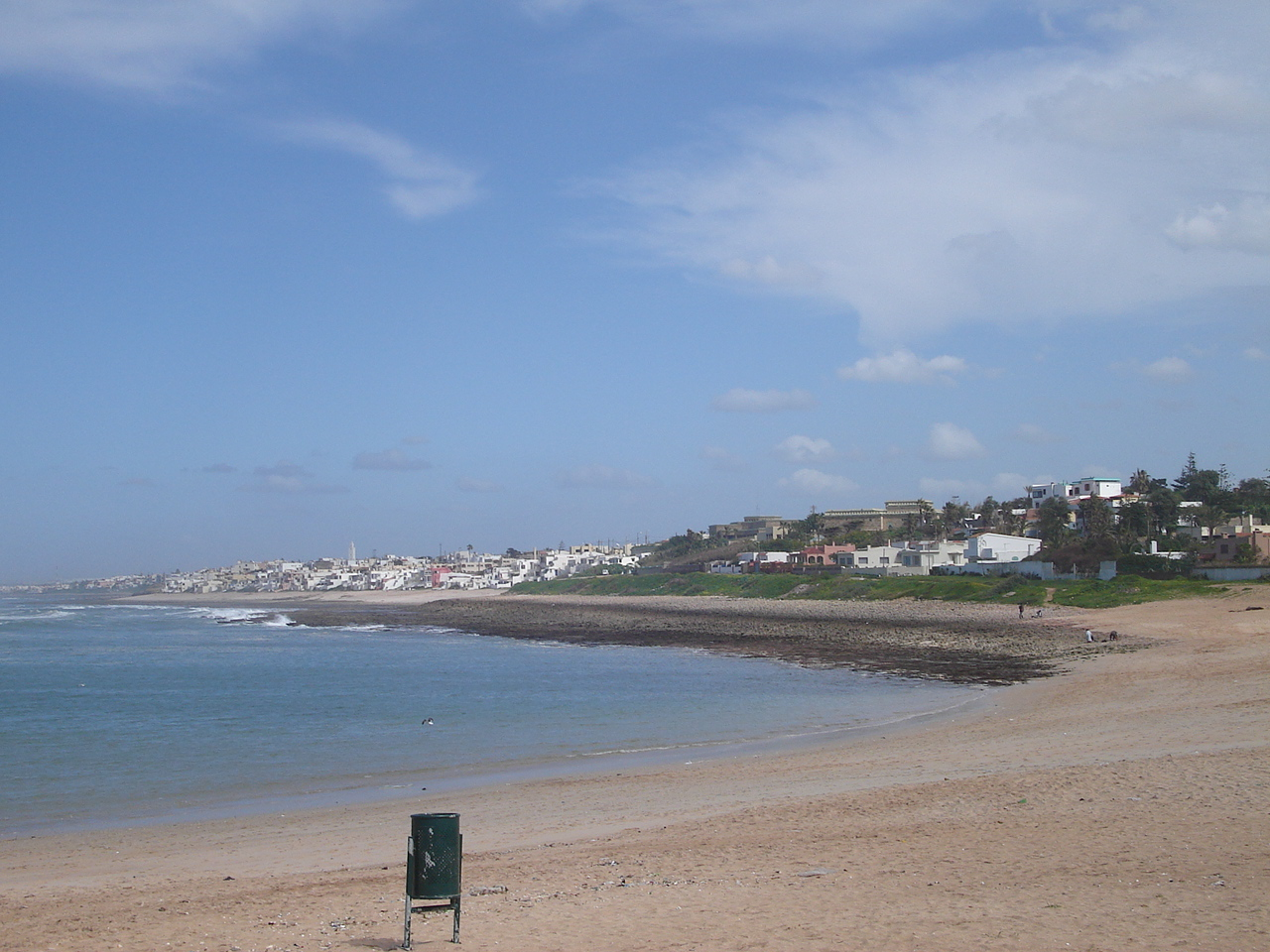 Plage du Casino, dite aussi Temara-plage, à Harhoura, au Maroc - شاطئ تمارة